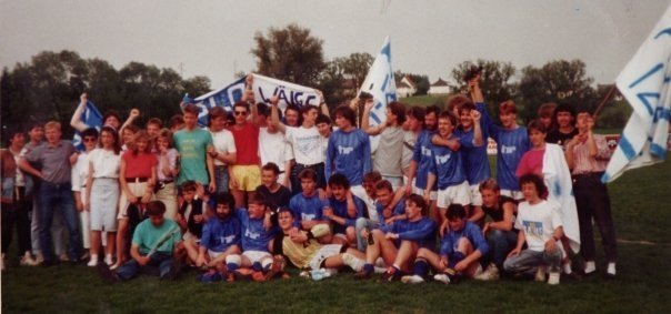 Opstiig 1987/88Brun